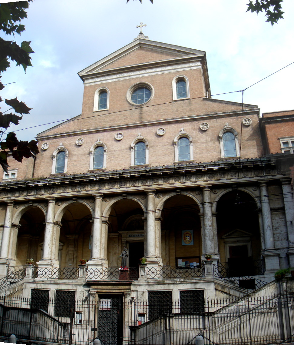 Roma, basilica di sant'Antonio da Padova (r. Esquilino)